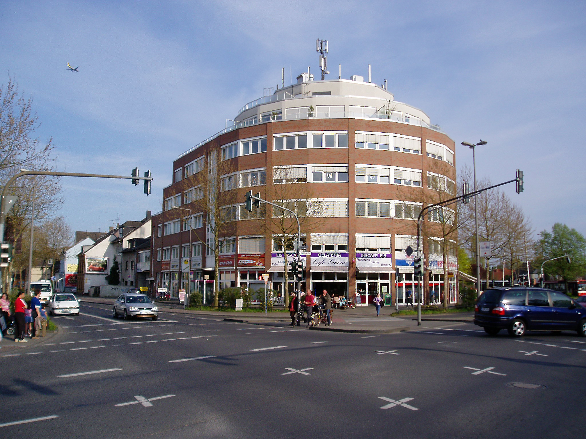 Rundhaus in Köln-Ostheim, Frankfurter Straße